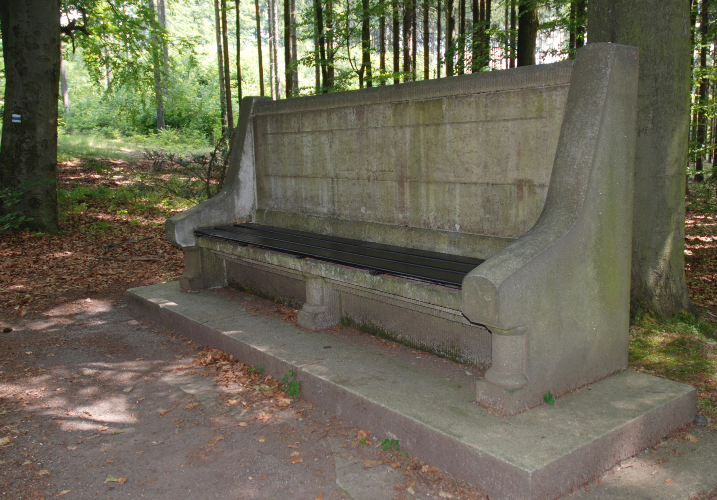 Lavička U Obrazu na cestě Přátelství v lázeňských lesích Karlových Varů